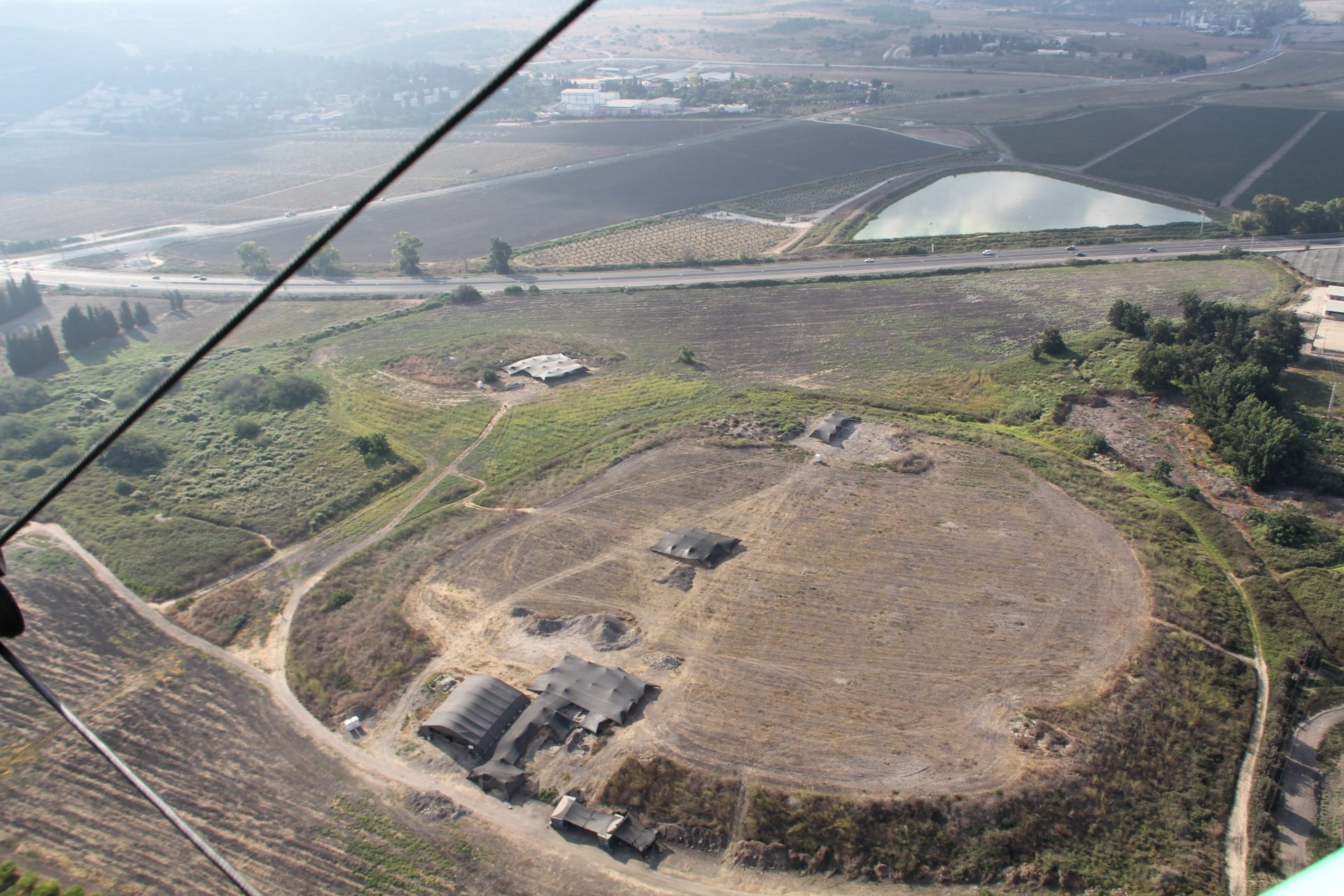 תל אסור ממבט על; see [1] for places in this image